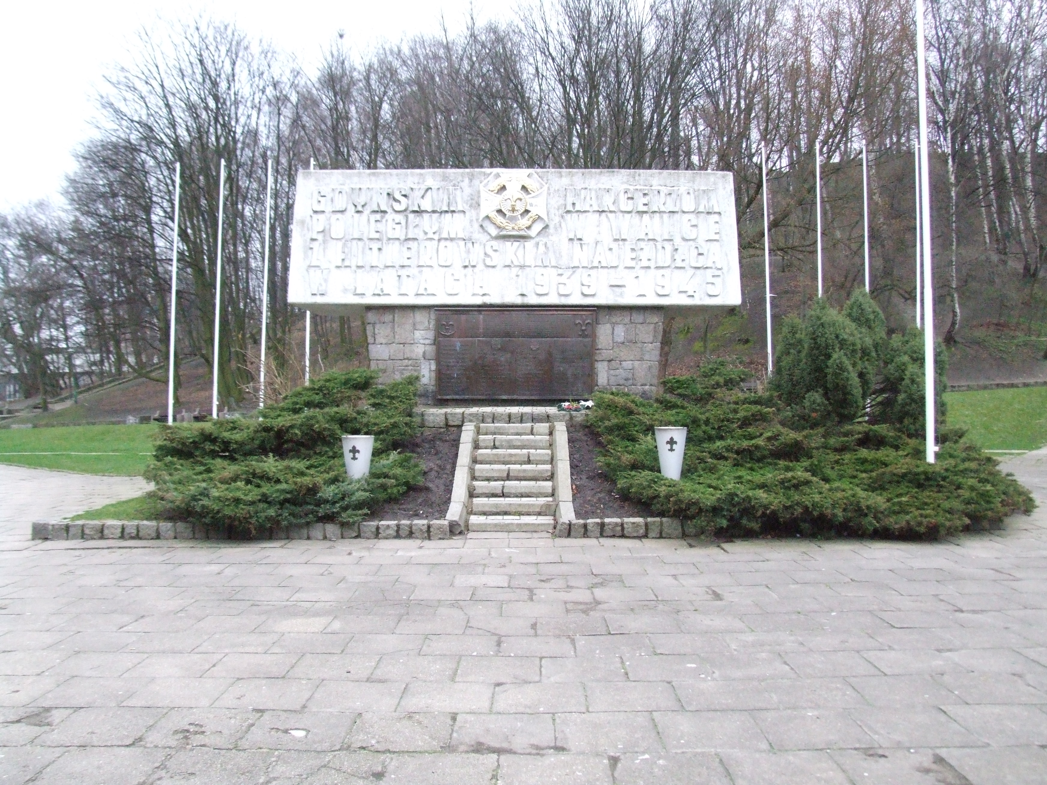 Pomnik Harcerzy Gdyńskich (Tajnego Hufca Harcerzy), Gdynia